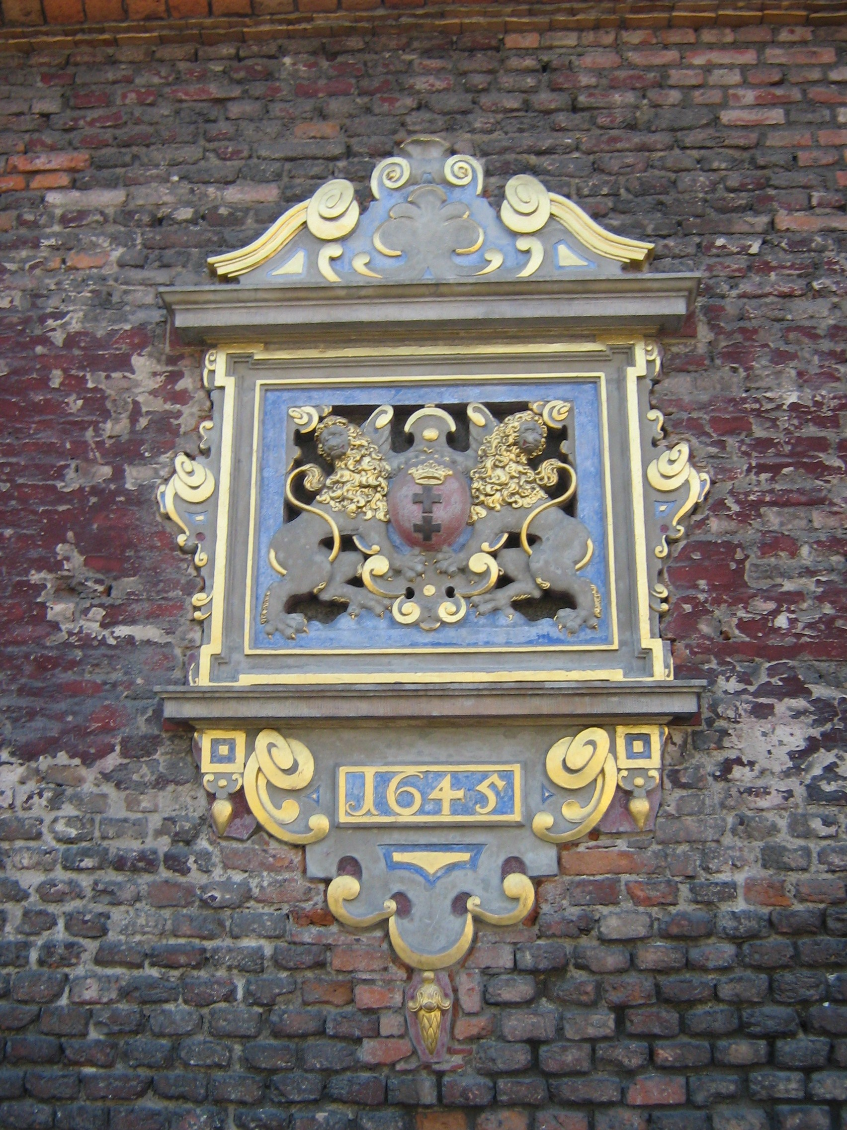 Gdańsk Stare Przedmieście, pl. Wałowy 15 - Mała Zbrojownia, 1643-1645, 1833 (Herb Gdańska)